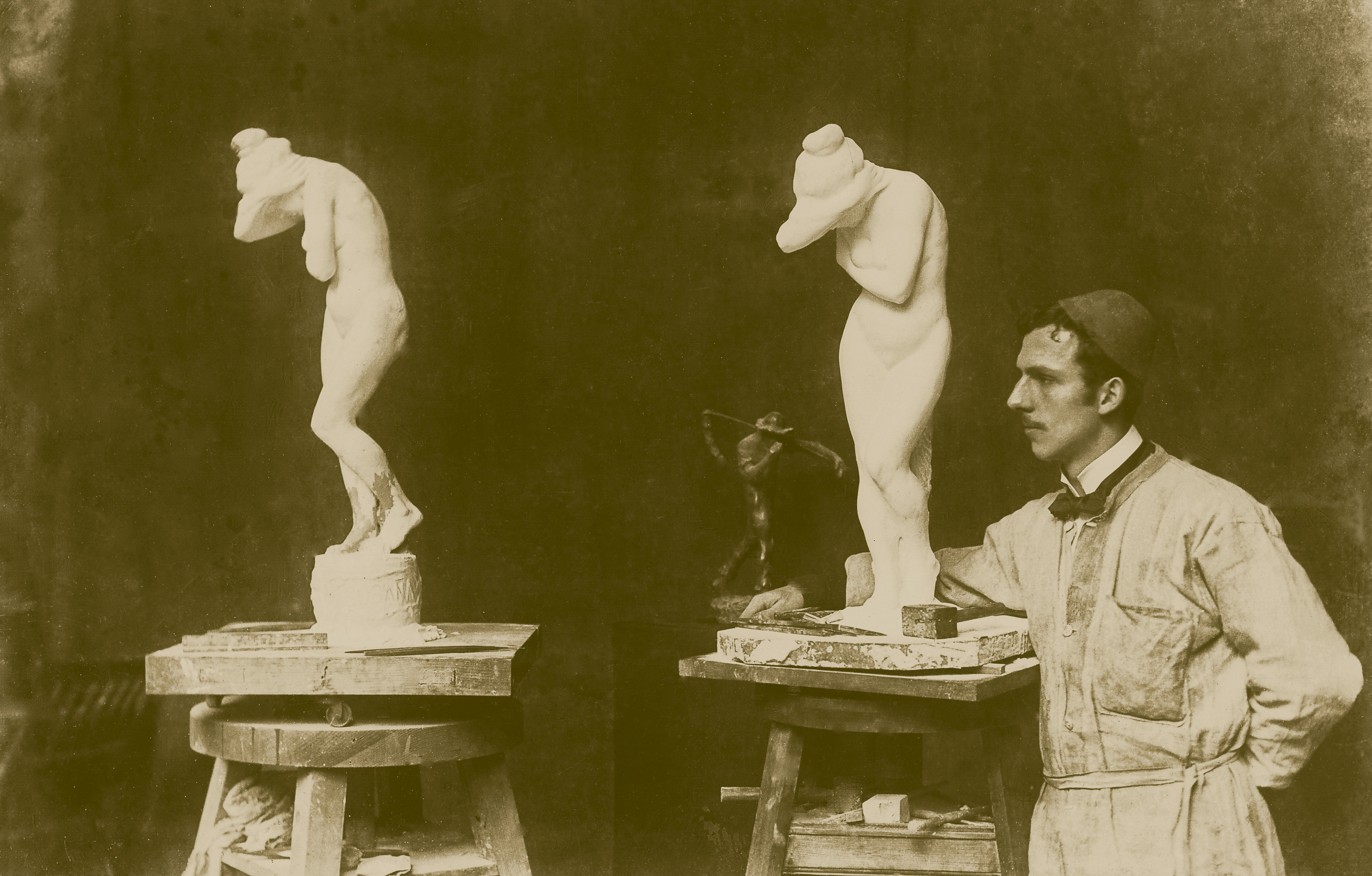 Marmeren Suzanna met Epple, 1899